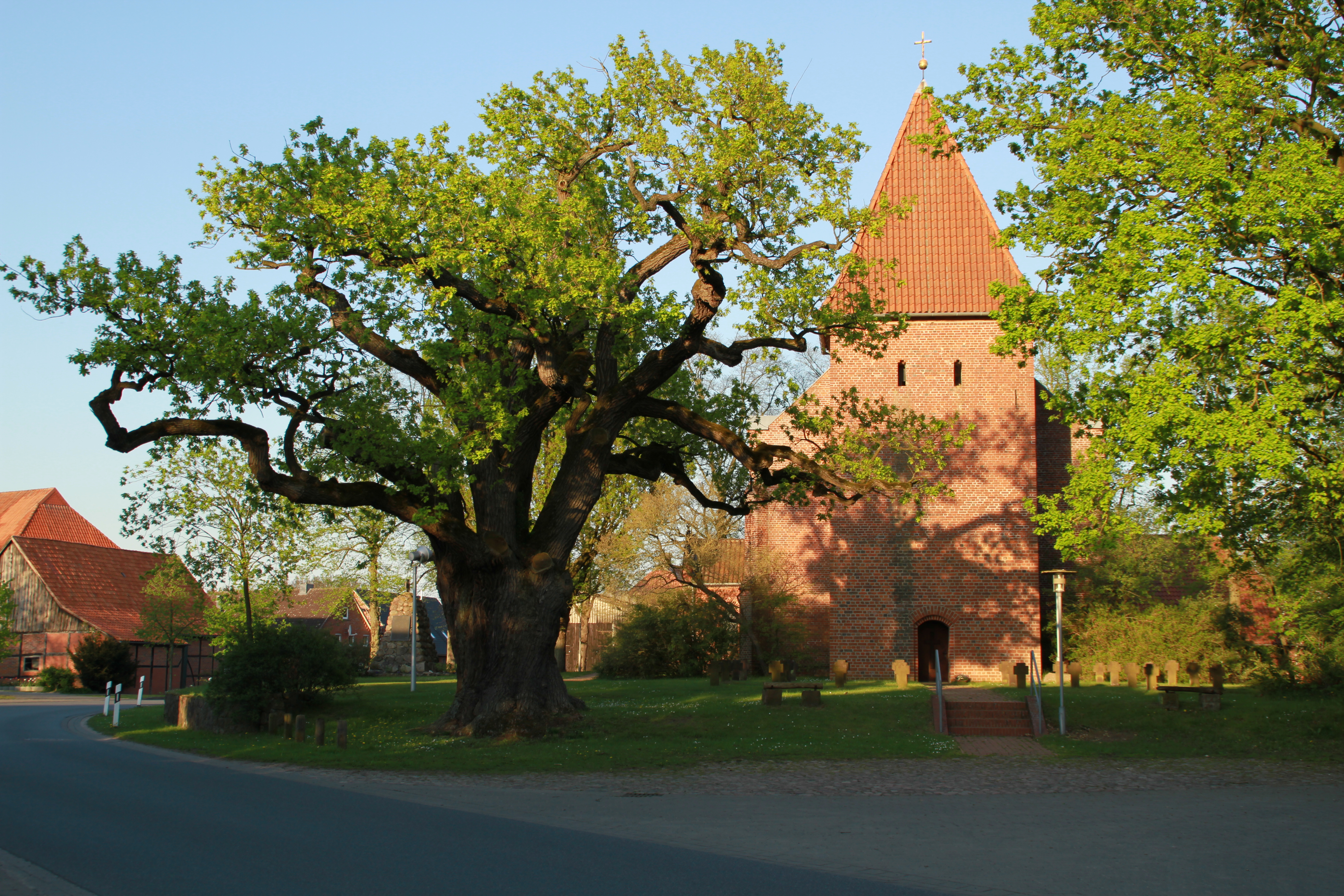 Die Eiche, welche an der Westseite der Kirche in Hittbergen im Landkreis Lüneburg steht, gilt als Naturdenkmal.